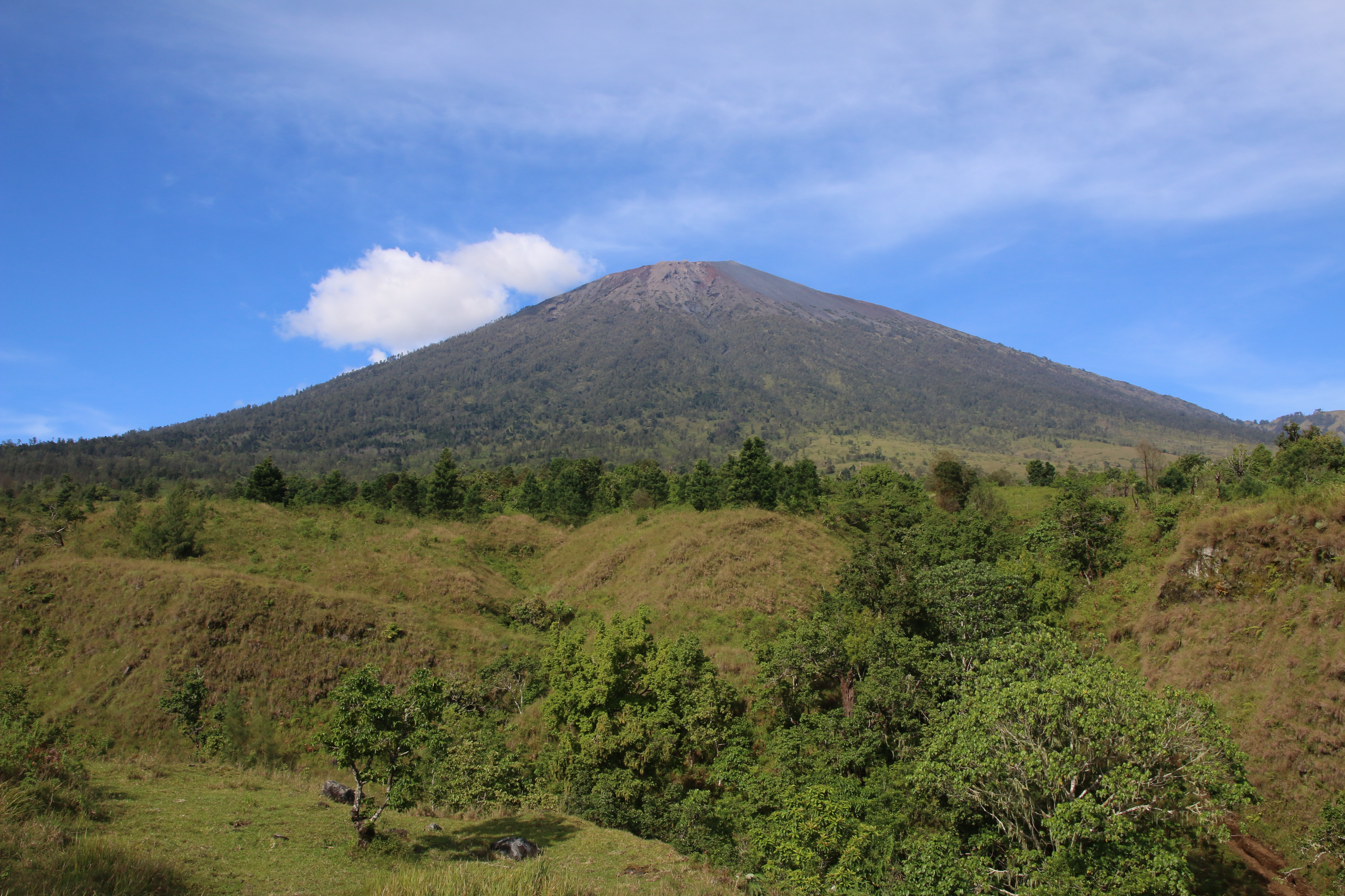 Pemandangan Puncak Gunung Rinjani dari jalur pendakian Sembalun